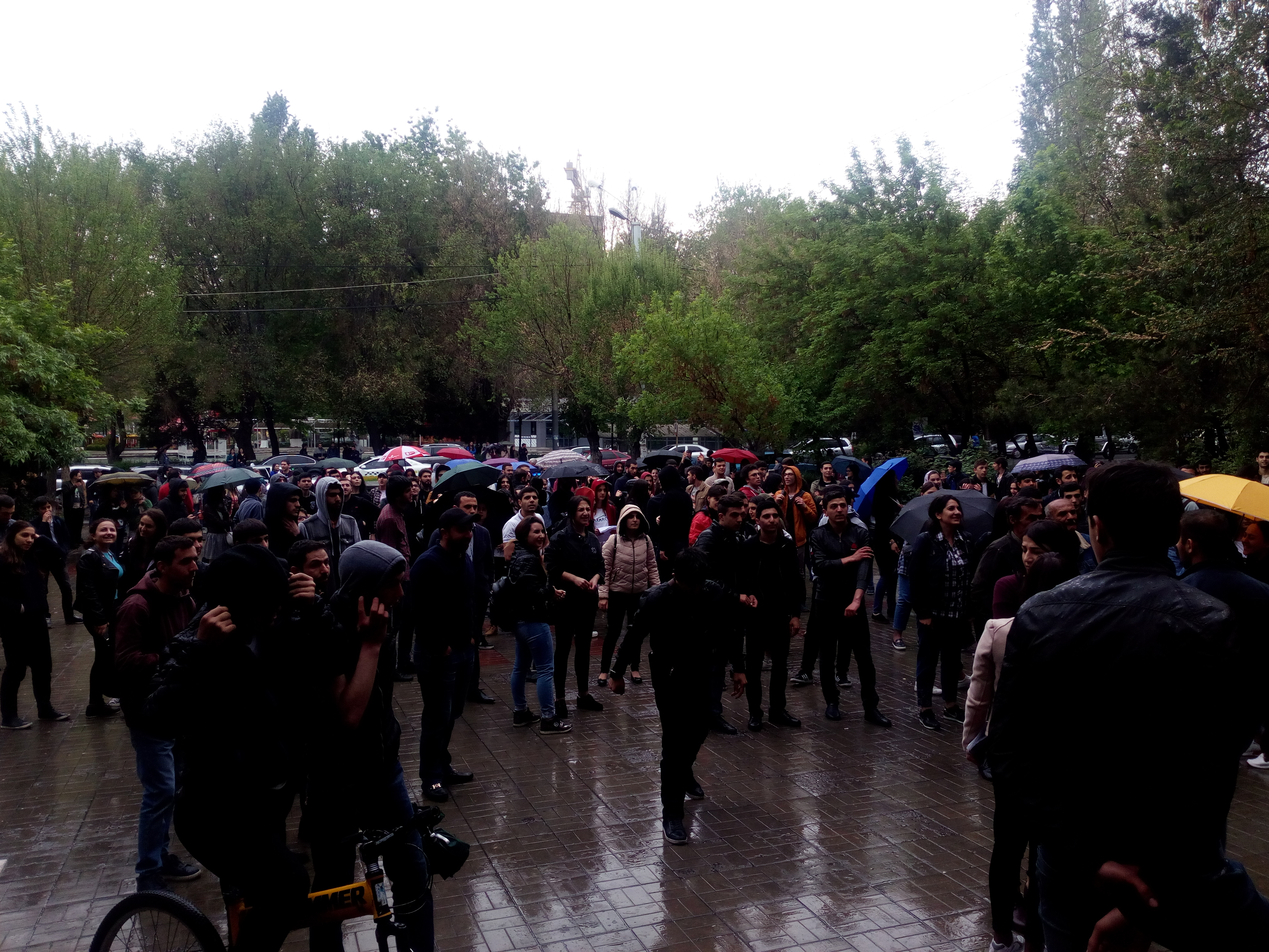 Ցուցարարները Մանկավարժական համալսարանի ներսում փակված դասախոսներին և ուսանողներին կոչ են անում իրենց միանալ